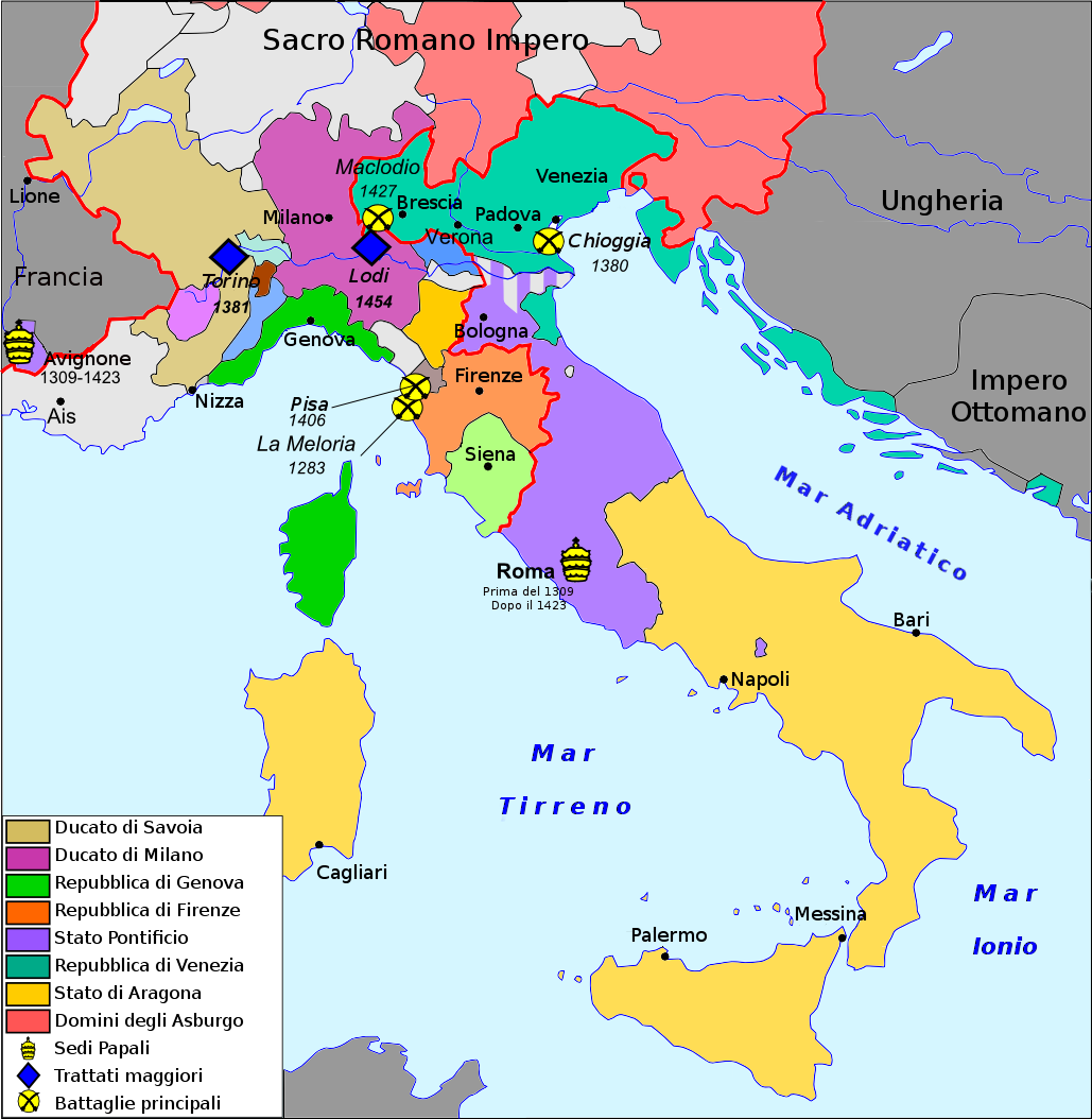 Pace di Lodi